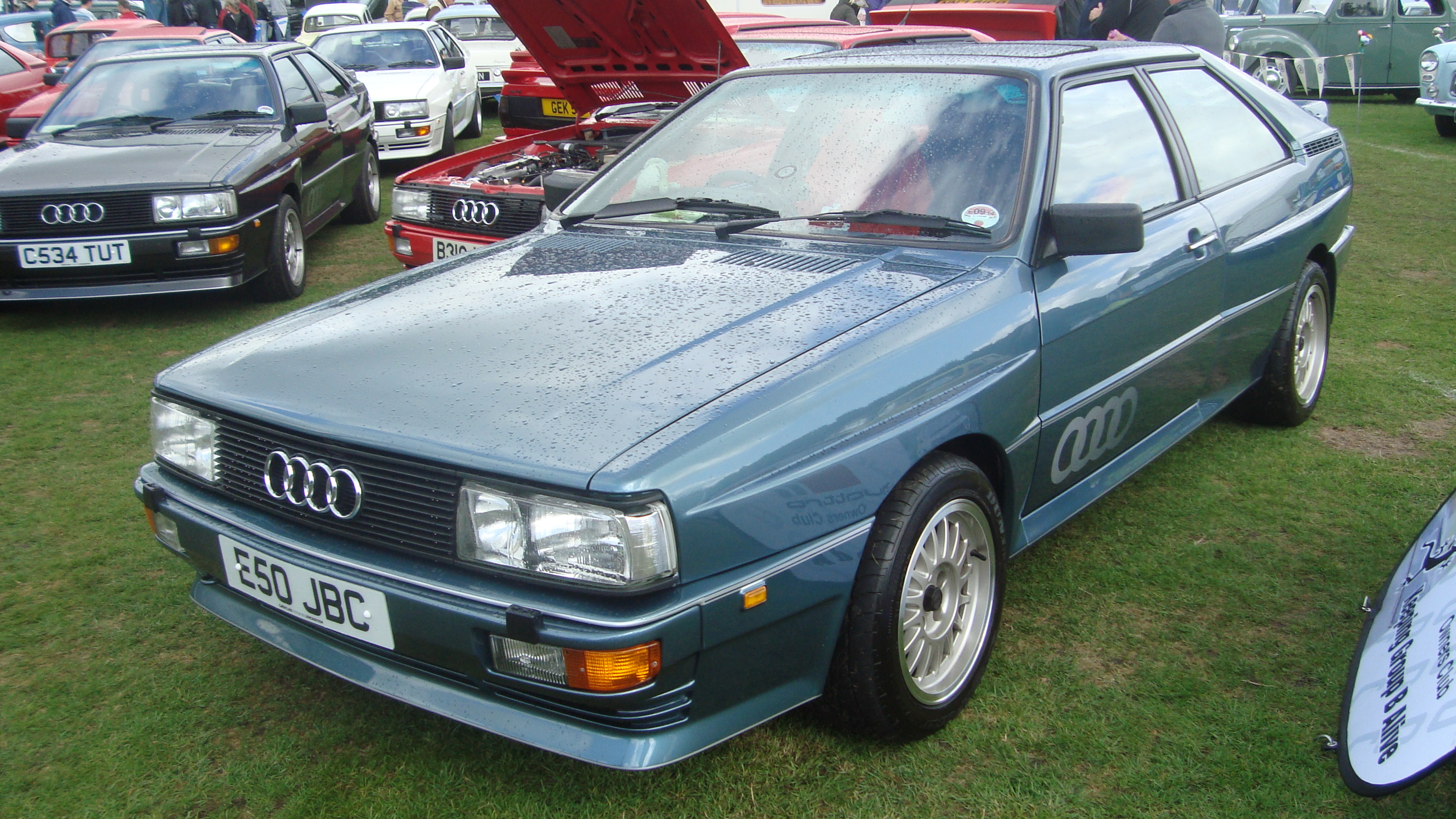 1988 Audi Quattro 2.2 Turbo